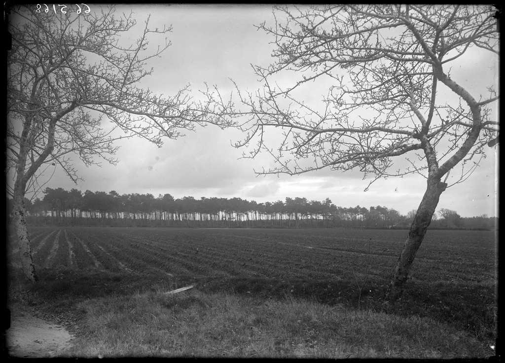 Reproduction numérique de la photographie de Félix Arnaudin réalisé le 30 décembre 1910 sur plaque de verre (13*18cm) présentant le champ et les pins